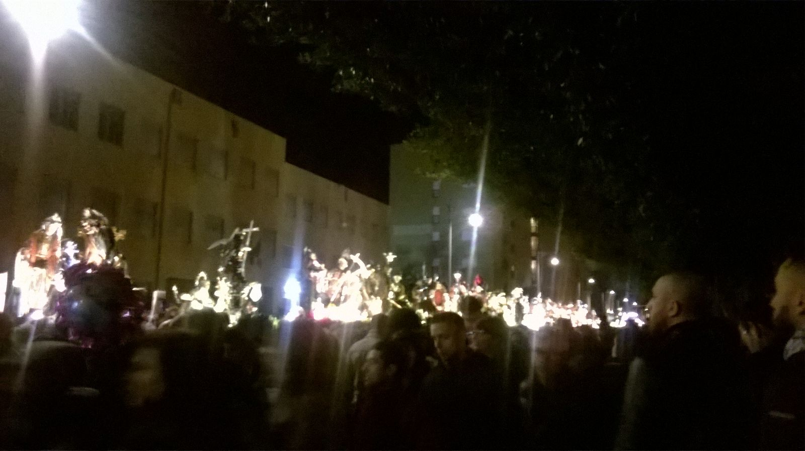 Processione dei Misteri del Venerdì santo, passaggio notturno in via Fardella, Trapani